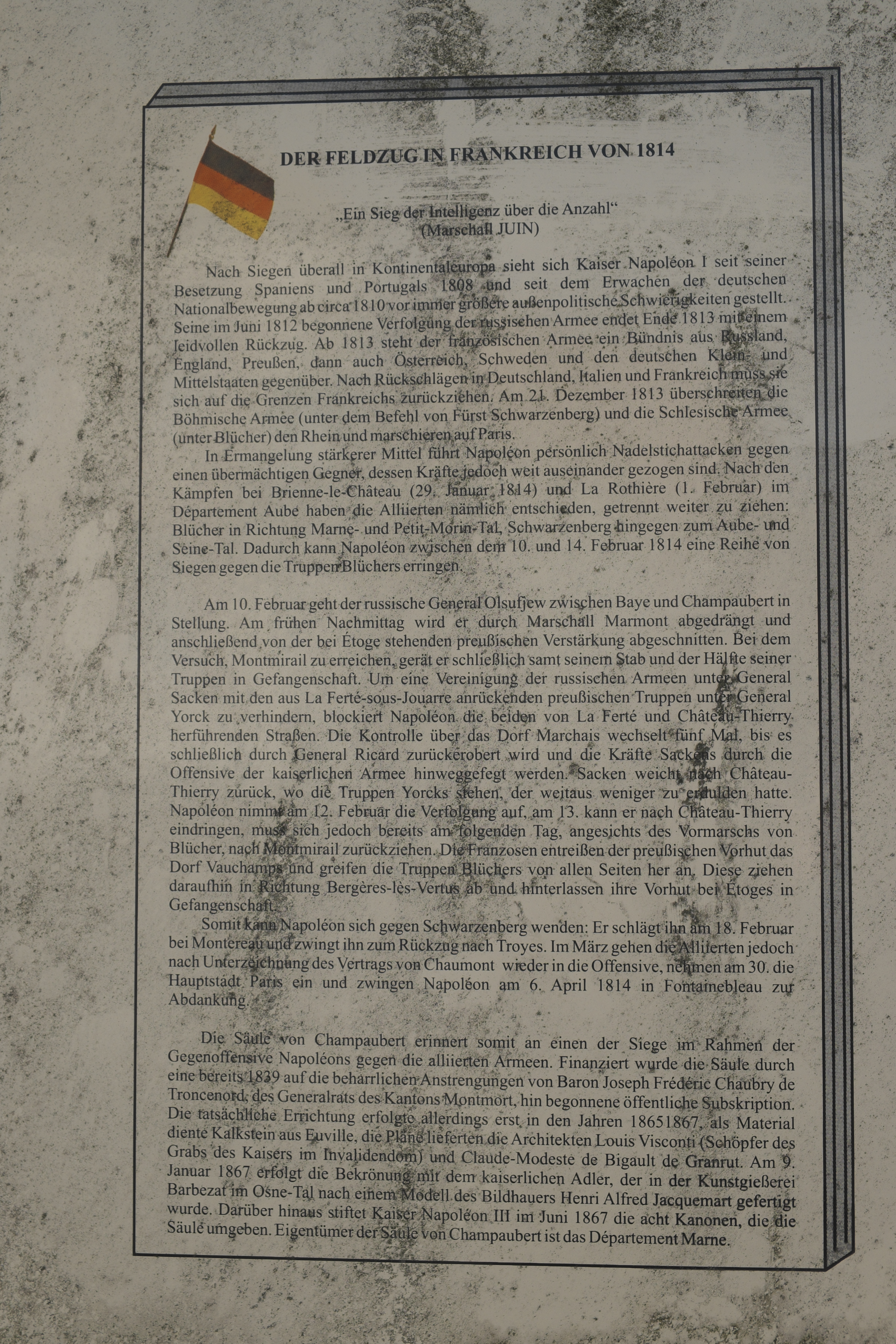 Gedenksäule für die Schlacht bei Champaubert in Champaubert im Département Marne (Region Alsace-Champagne-Ardenne-Lorraine/Frankreich), Erklärungstafel